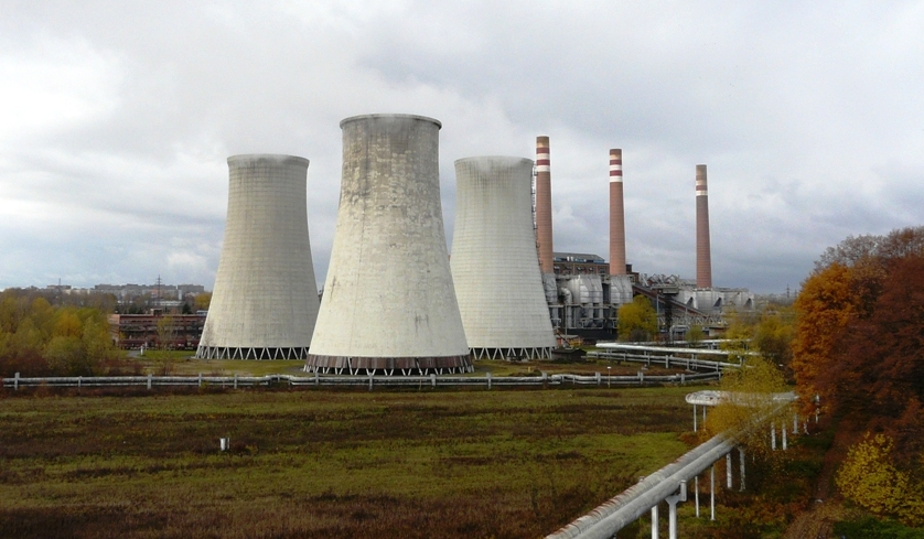 Třebovice, elektrárna. Pohled z dálnice D1.